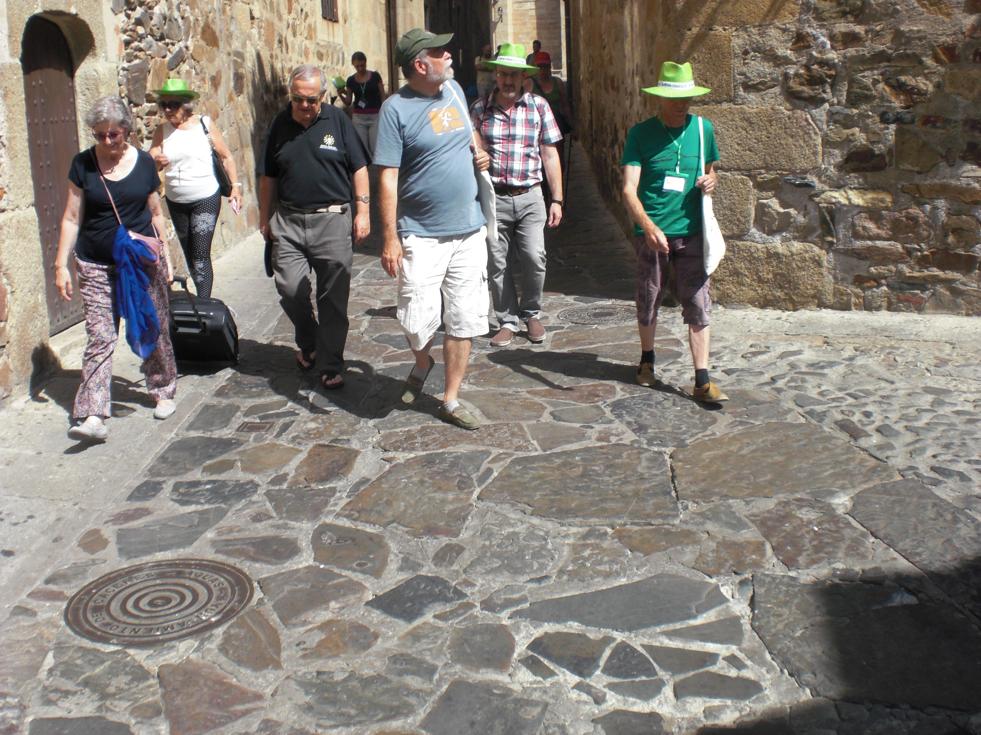 postkongresa ekskurso en Cáceres